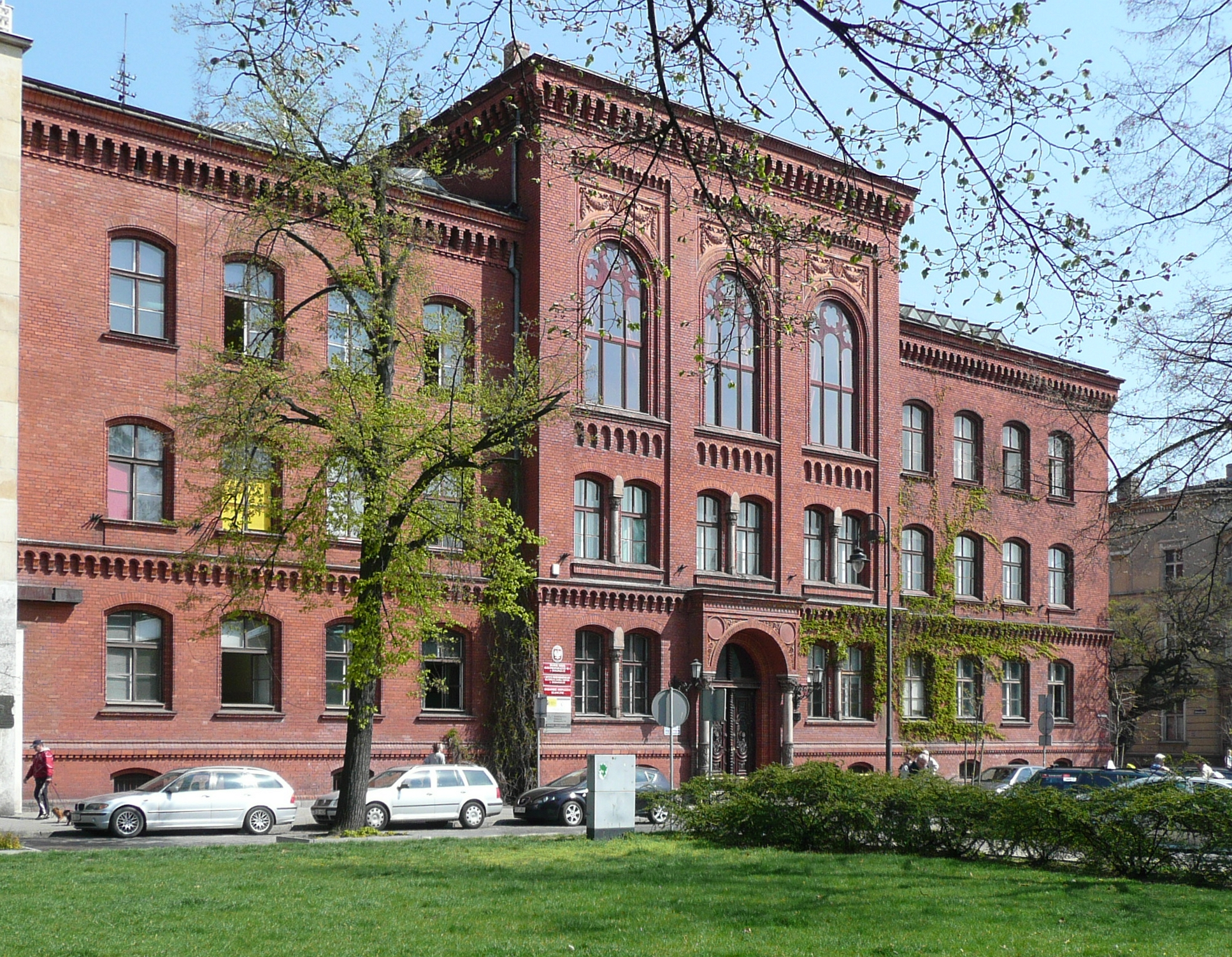 I Liceum Ogólnokształcące im. Cypriana Kamila Norwida w Bydgoszczy – liceum ogólnokształcące w Bydgoszczy, położone przy pl. Wolności 9.